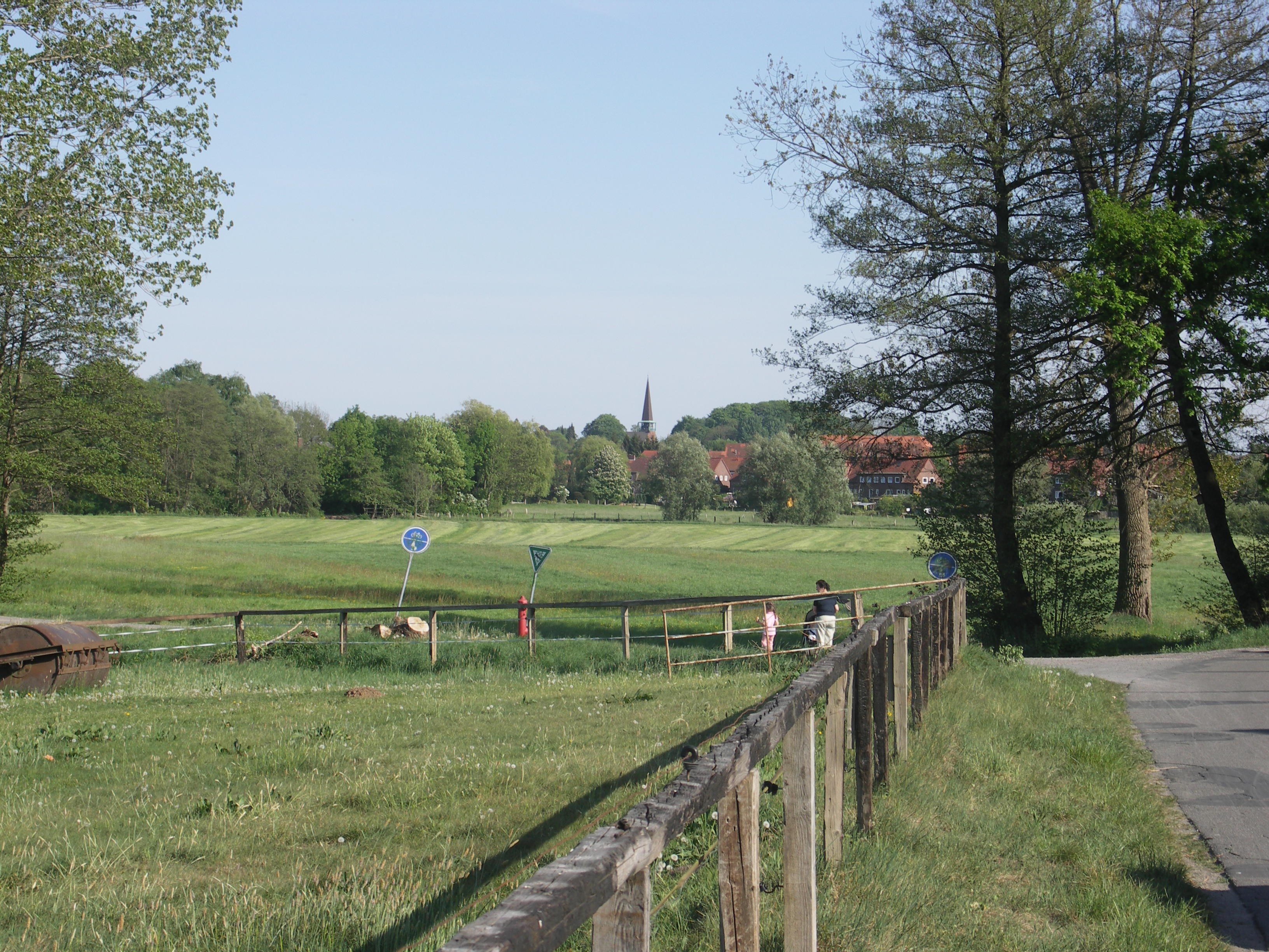 Die Schwingewiesen im Mai [2007/05]